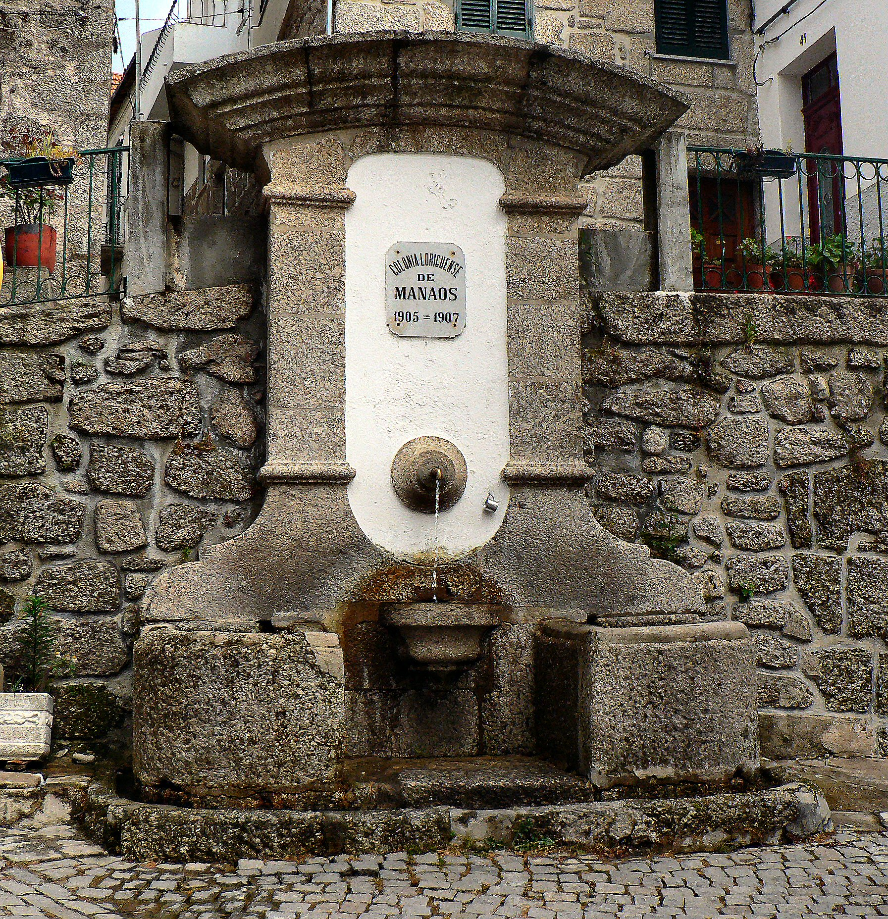 Um dos fontanários de Loriga